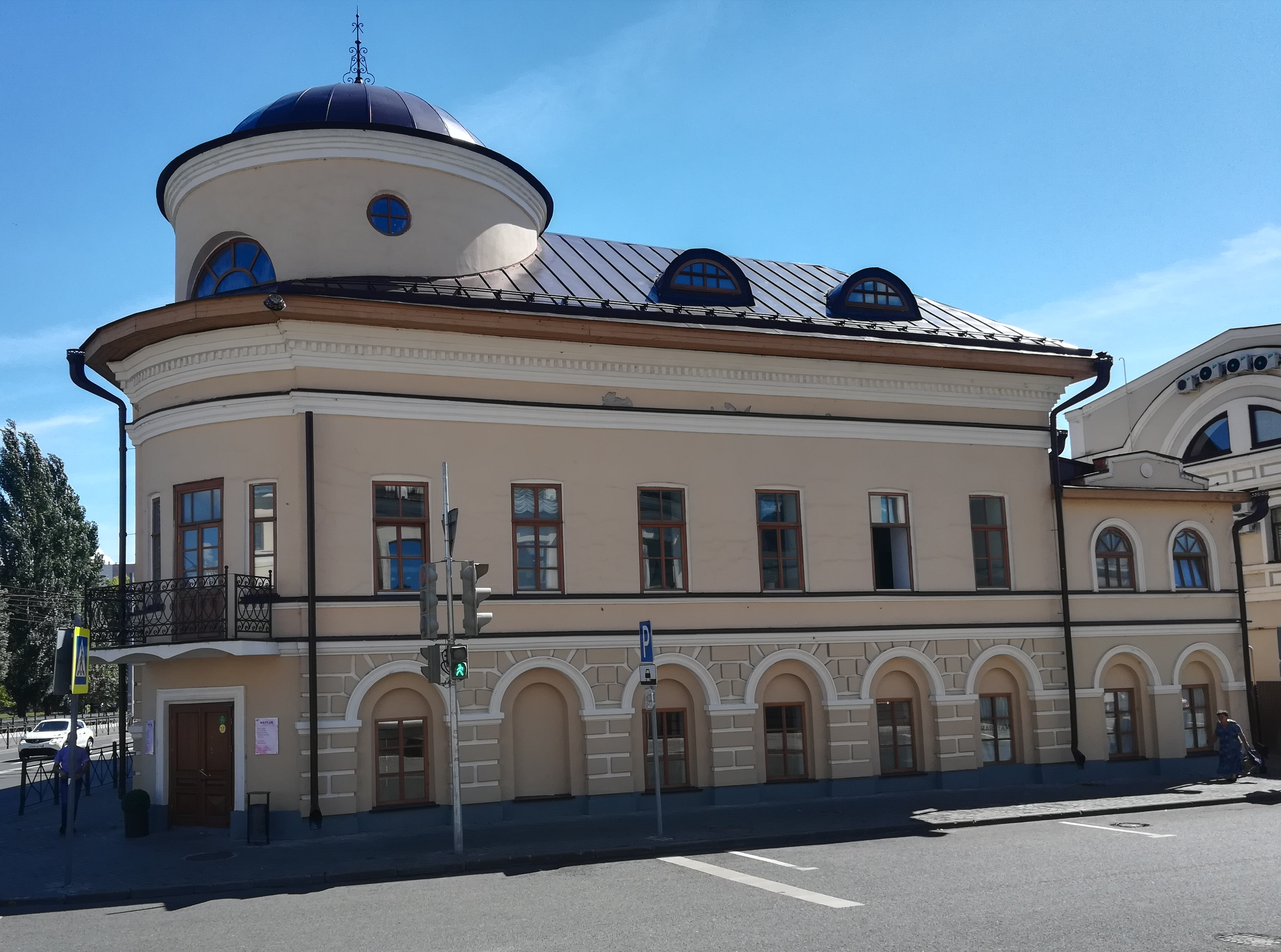 Московская улица в Казани